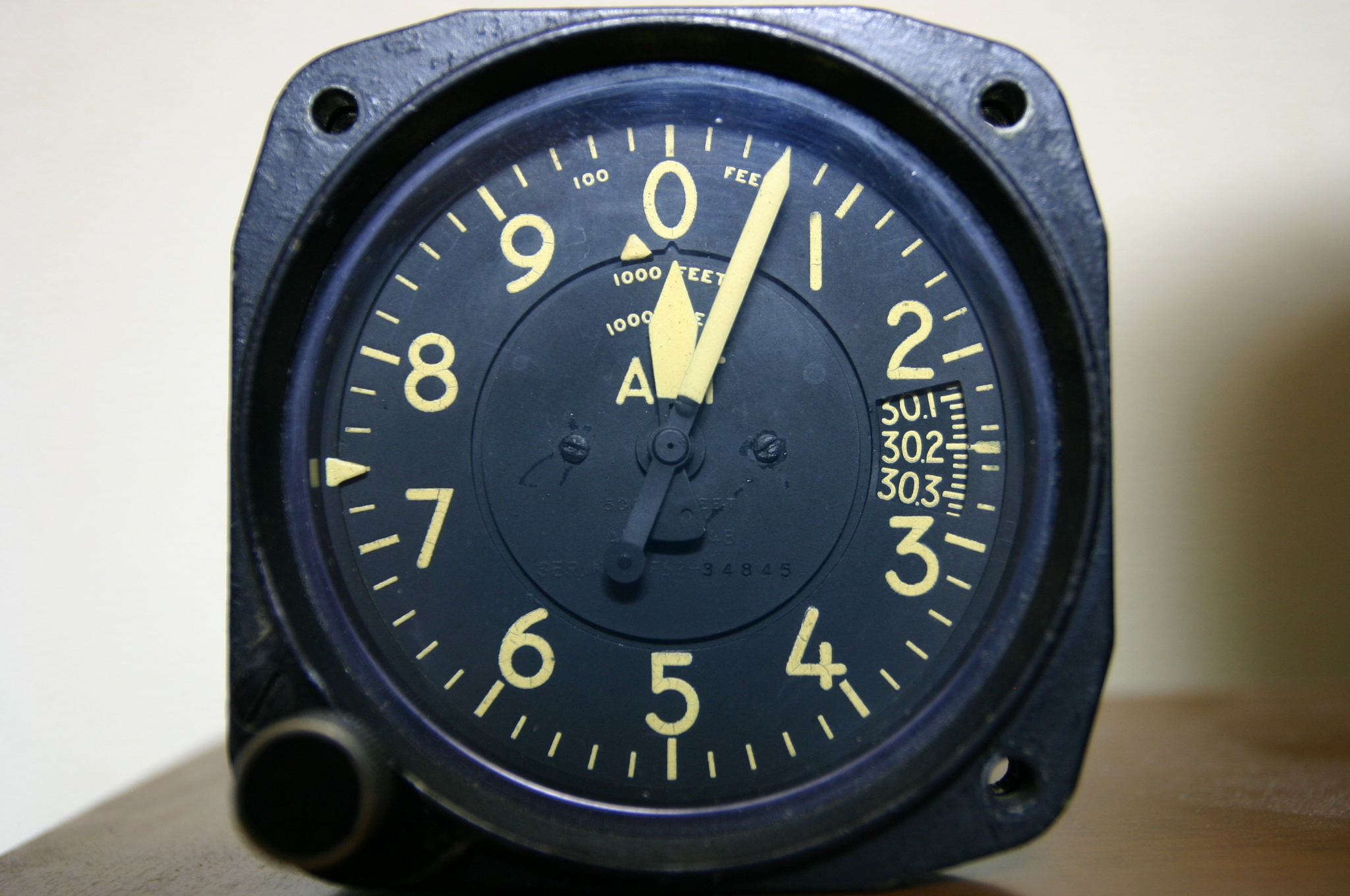 altimeter.